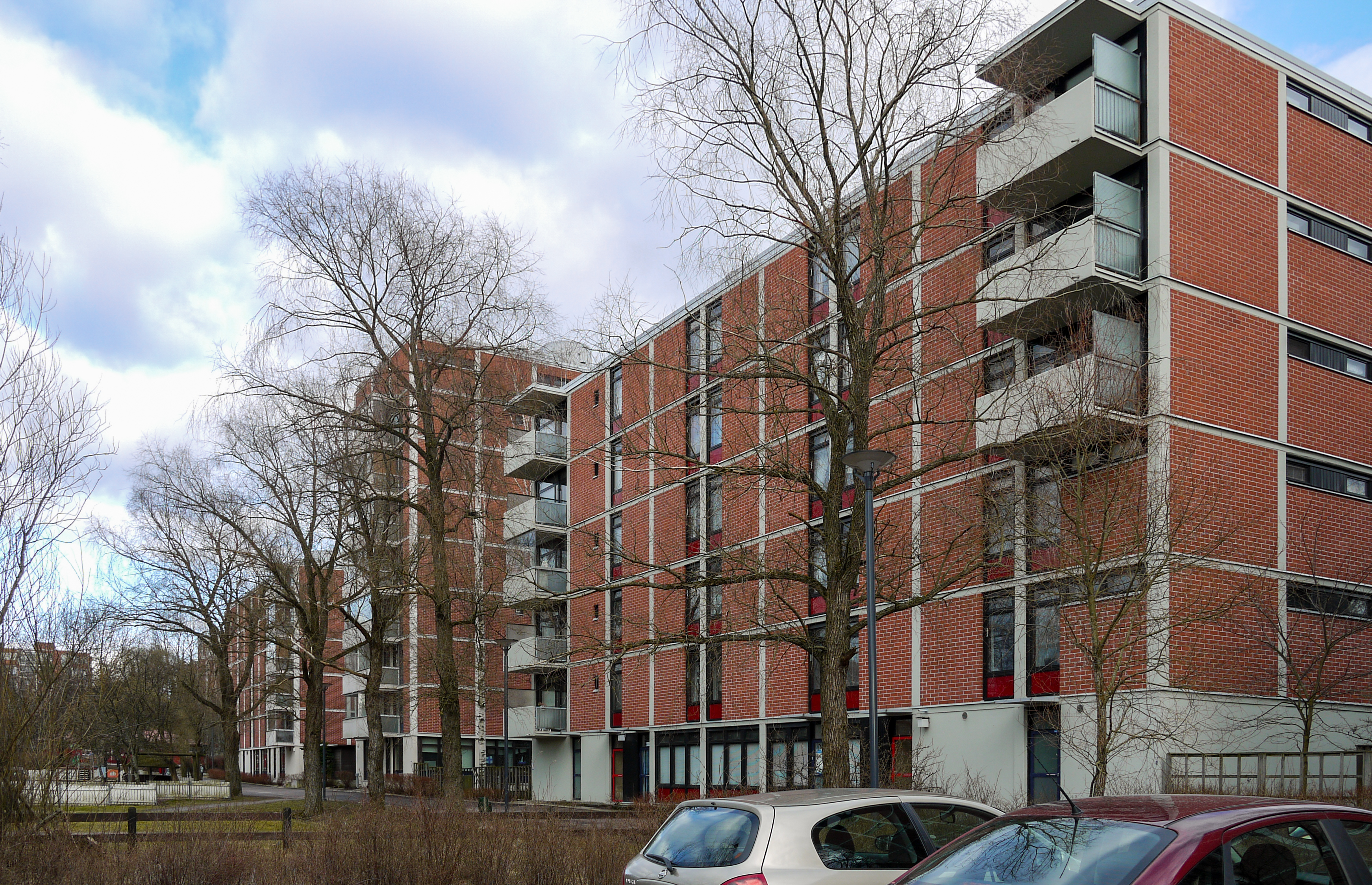 Kerrostaloja Espoon Kuitinmäessä.